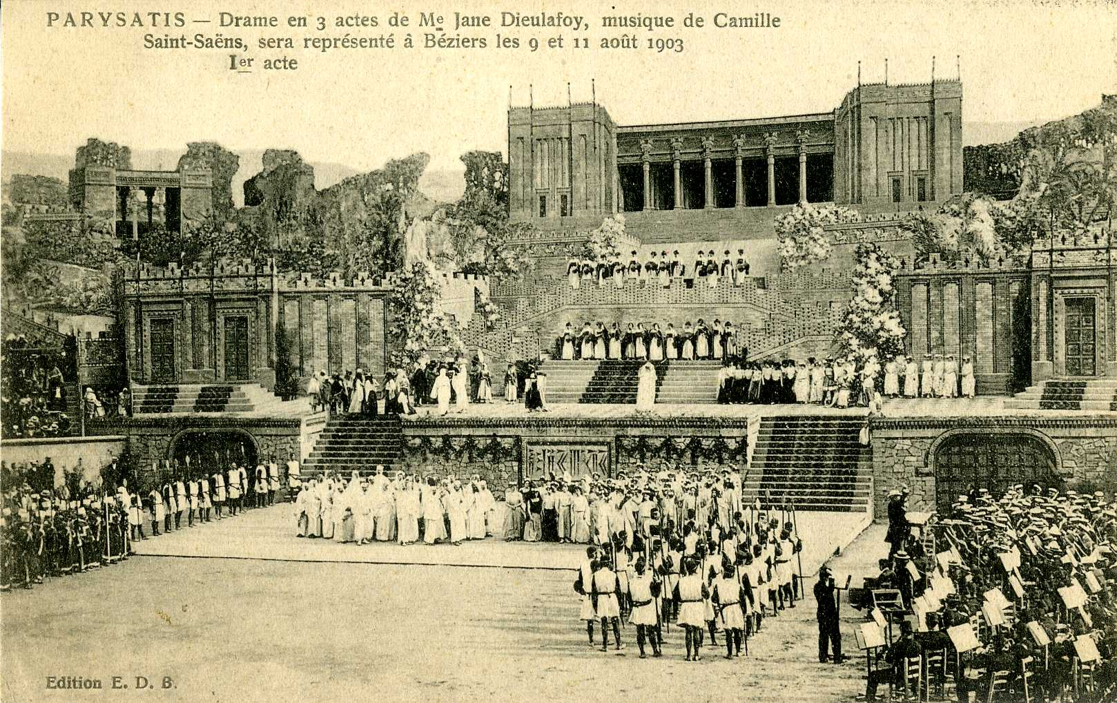 Carte postale éditée en 1902 lors de la représentation de l'opéra Parysatis de Camille Saint-Saëns au Théâtre des Arènes, à Béziers.